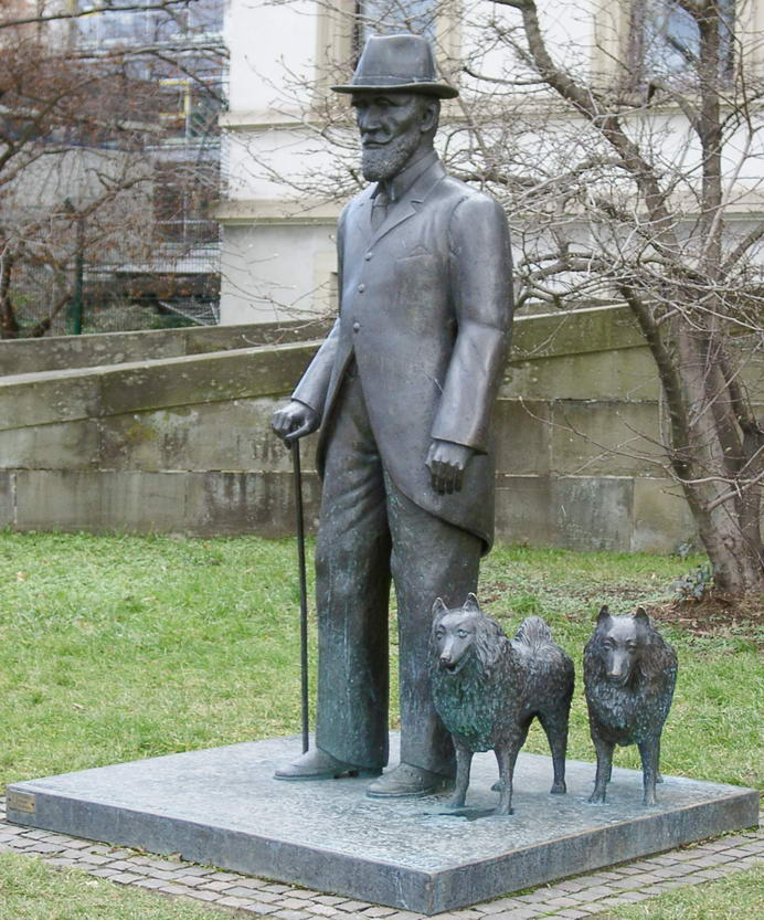 Wilhelm II.; Denkmal in Stuttgart vor dem Wilhelmspalais - 1991 von Hermann-Christian Zimmerle .